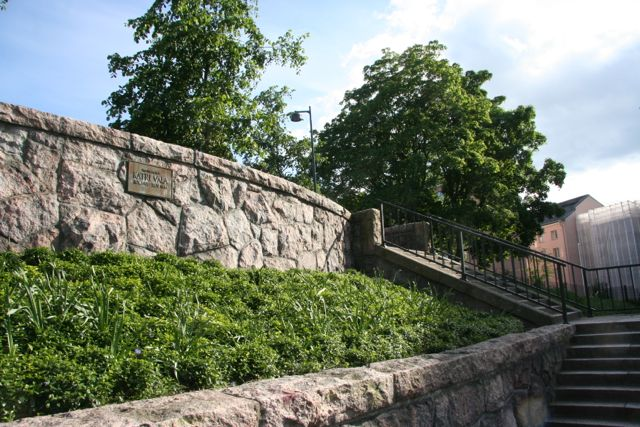 Katri Valan hauta, Helsingissä.